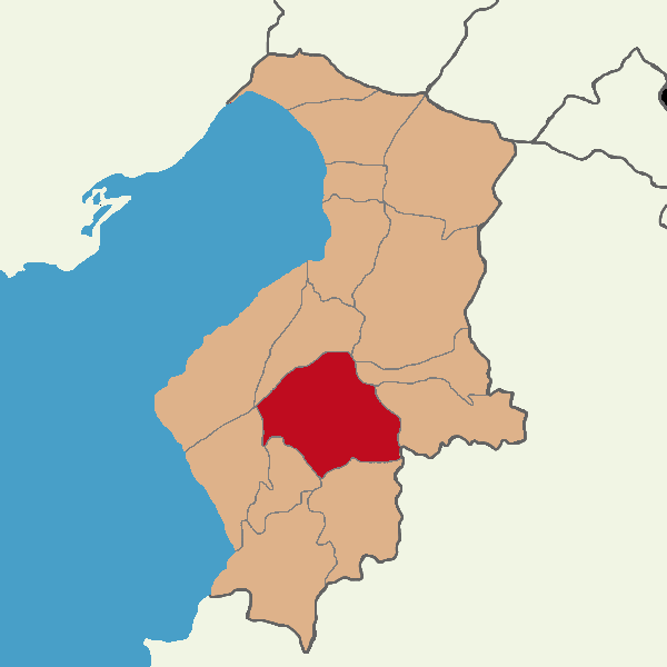 Antakya ilçesinin konumu